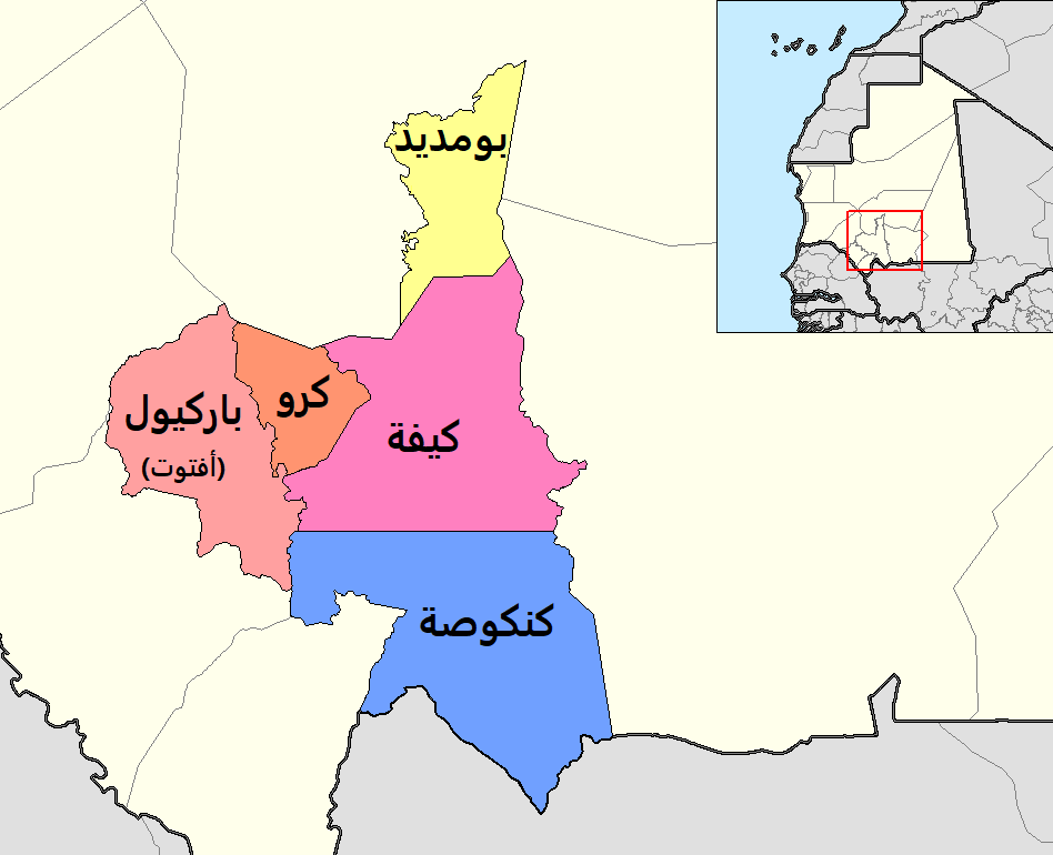 تعريب خريطة بيانية للمقاطعات الخمسة في ولاية العصابة في موريتانيا